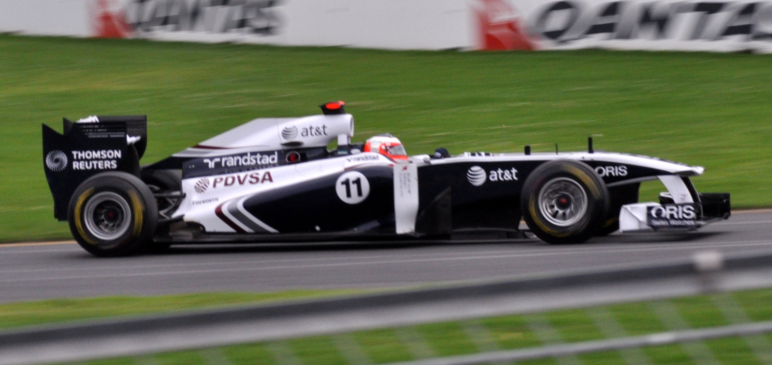 Aus F1 GP Weekend 2011 87